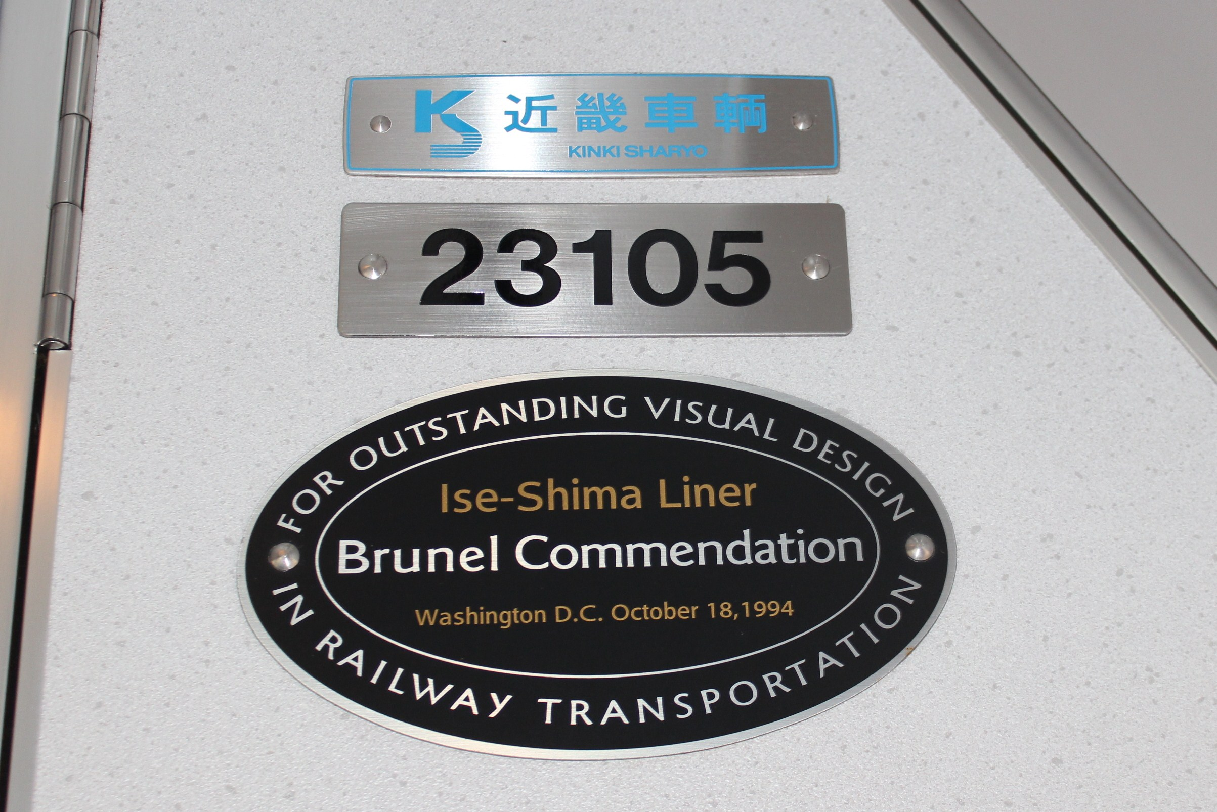 23000系ブルネル賞受賞プレート